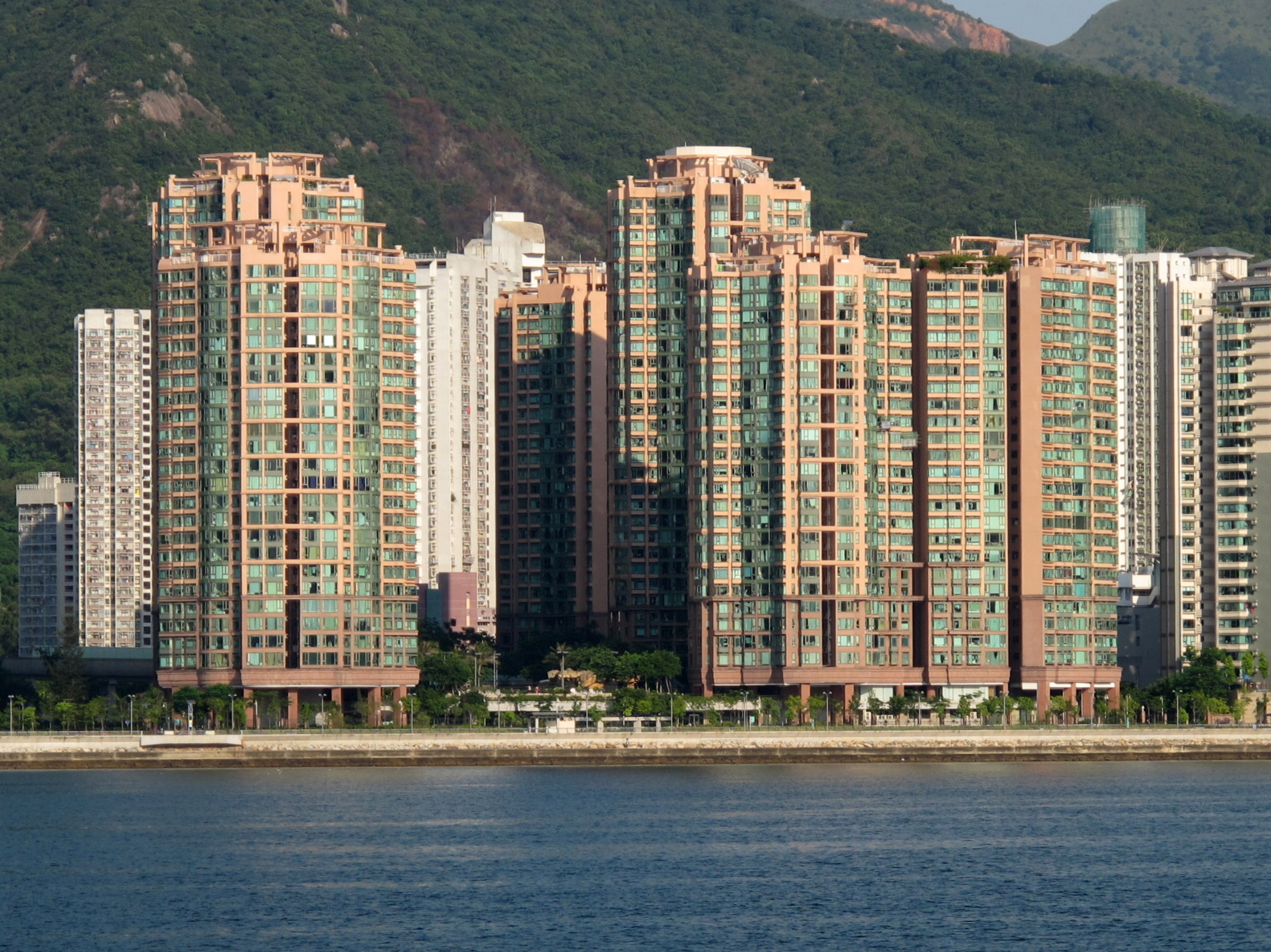 Vista Paradiso